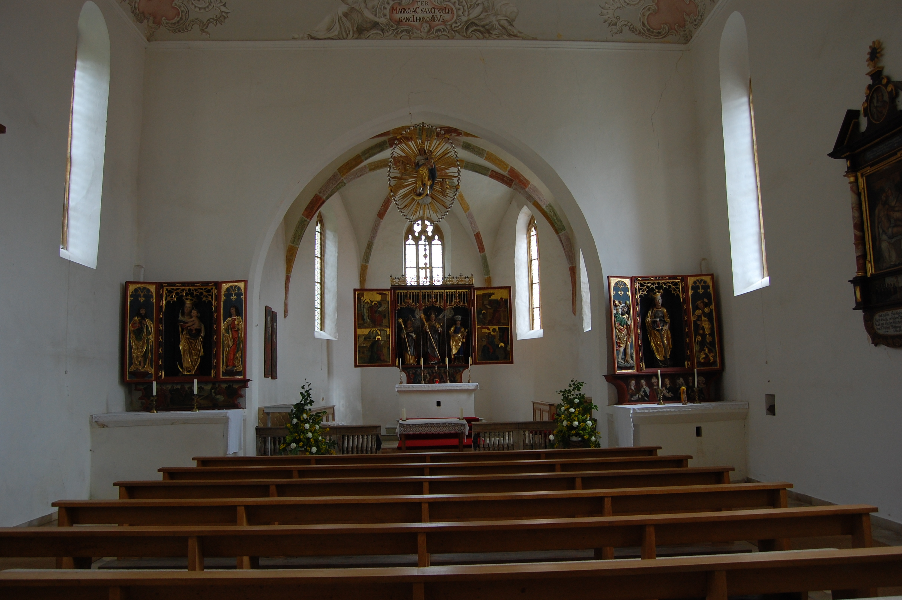 Wallfahrtskirche St. Wolfgang bei Velburg, Innenansicht (2011)